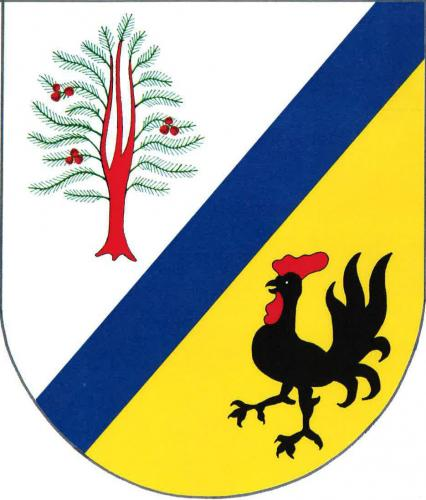 znak, Terešov, okres Rokycany